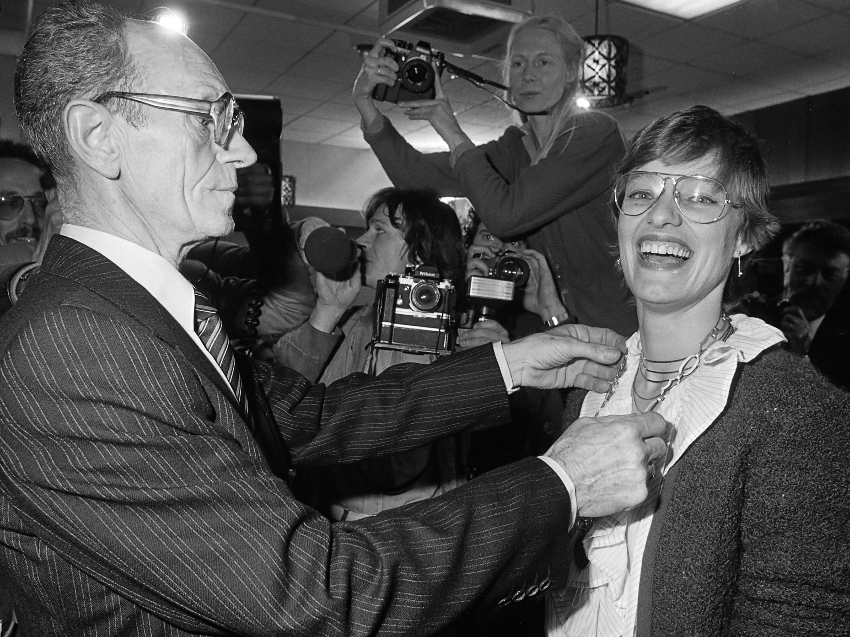 Eerste communistische burgemeester in Nederland; Mevrouw H. Jagersma wordt als eerste communistische burgemeester in Nederland in Beerta geïnstalleerd 1 april 1982